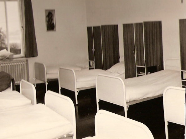 Schlafzimmer im "Don Bosco Kinderheim" Osnabrück